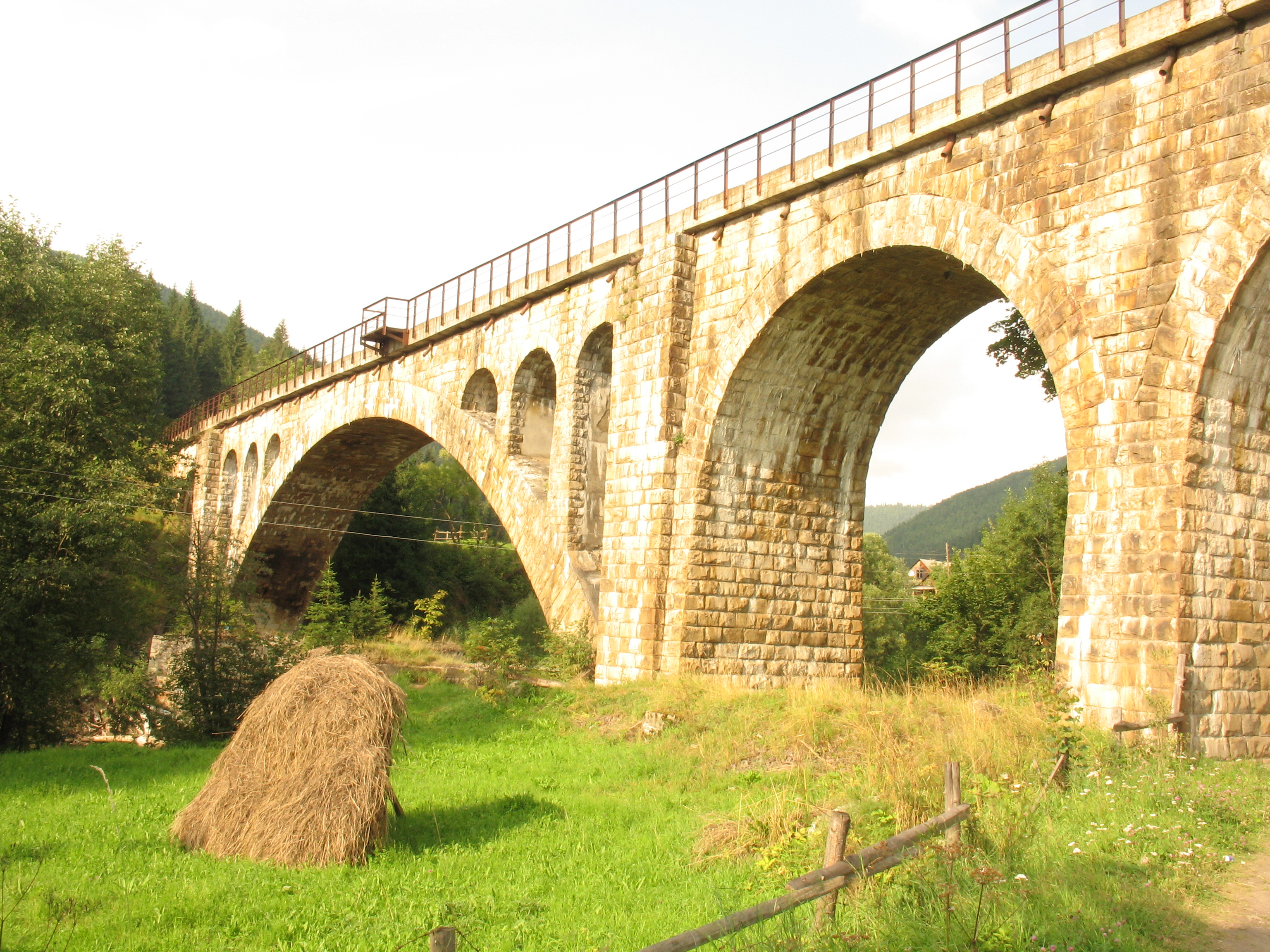 Залізничні кам'яні мости (мур.), Ворохта